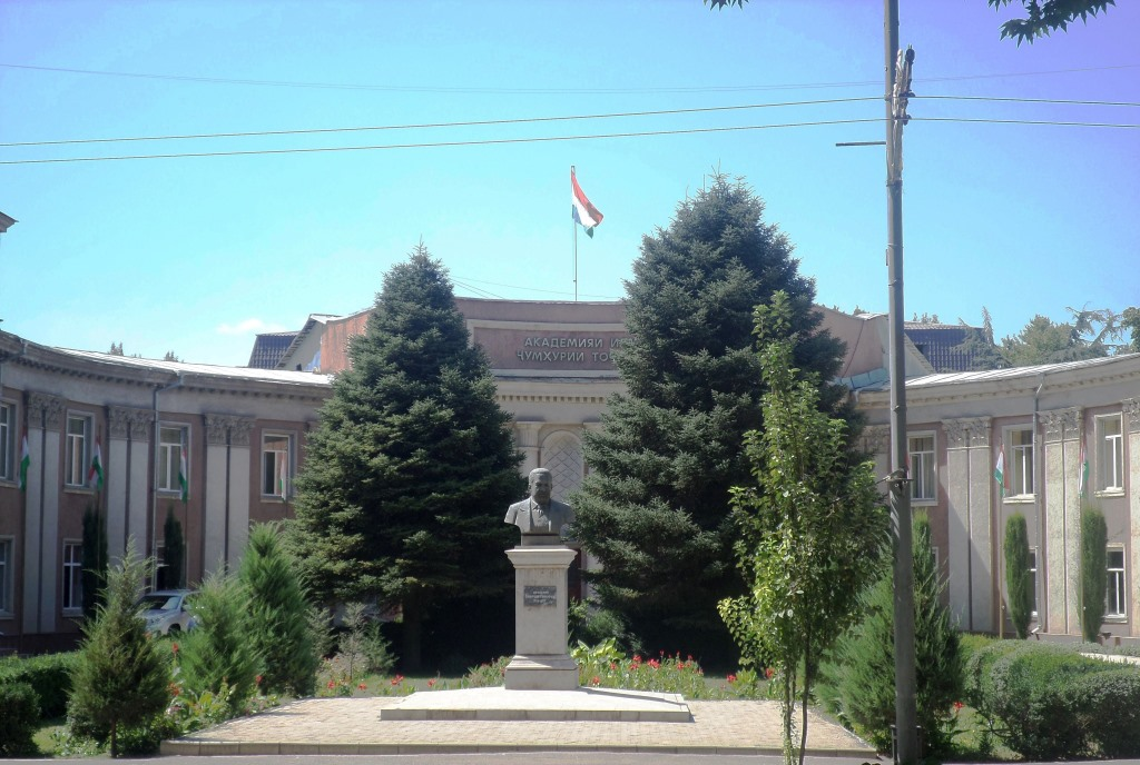 Академия наук Таджикистана